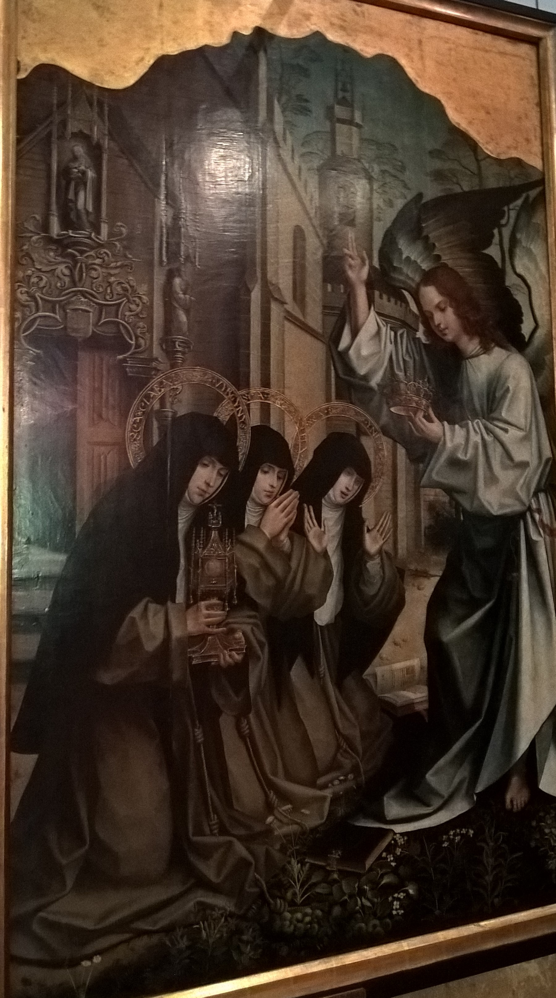 Aparição de um Anjo às Santas Clara e Inês de Assis e Coleta de Corbie pintura atribuida à oficina do Jorge Afonso de 1517-1530 e que fez parte do Retábulo Convento de Jesus